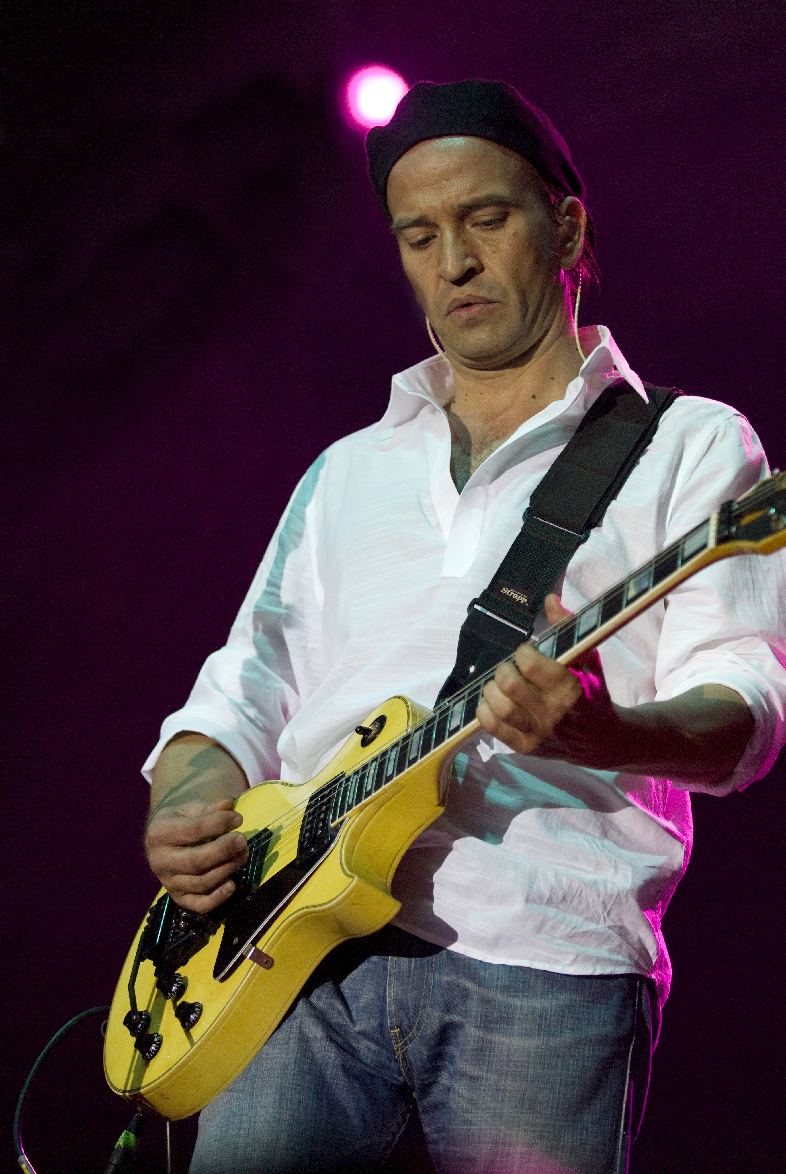 Los Secretos